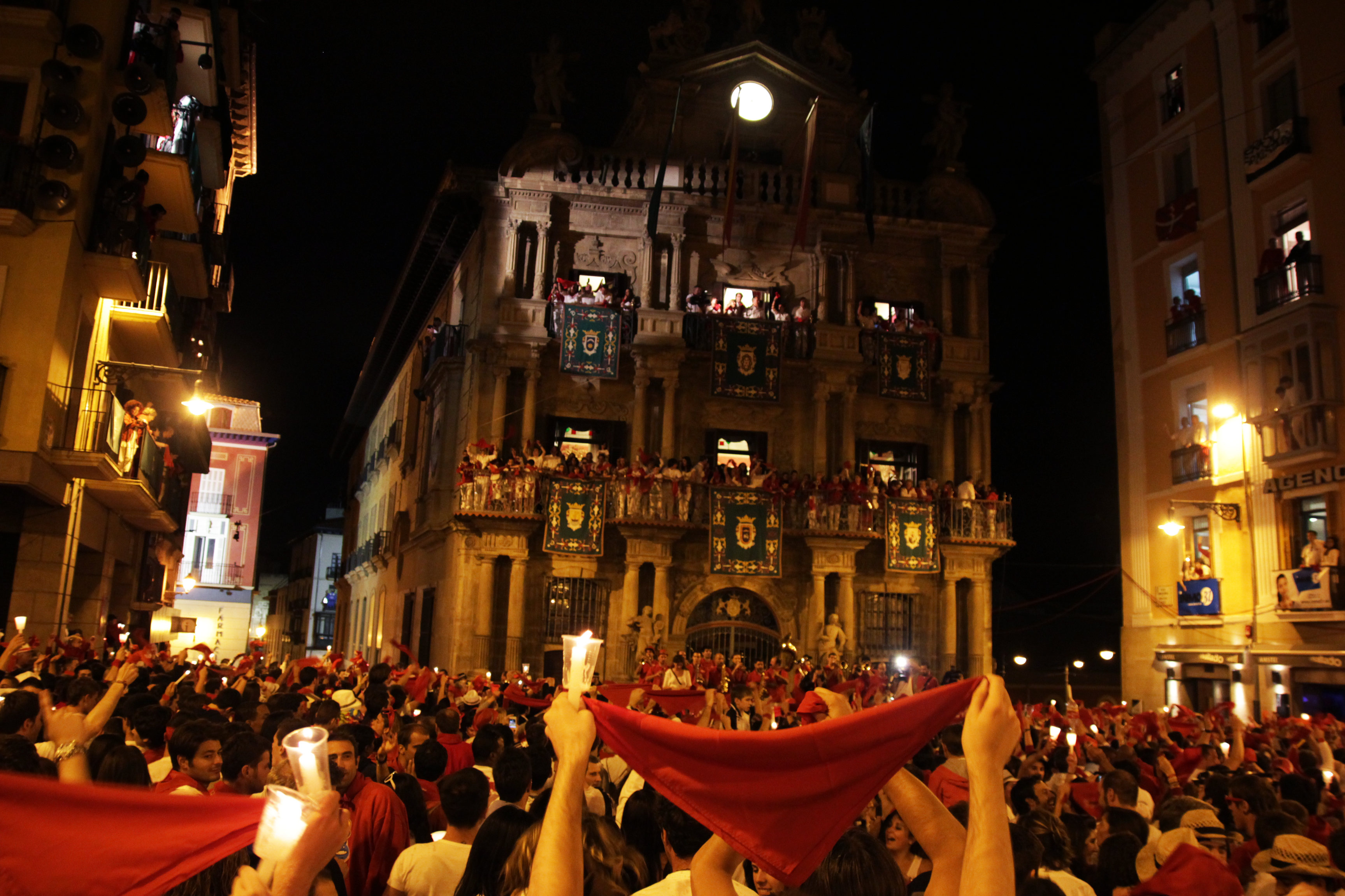 Plaza del Ayuntamiento en el "Pobre de mí"